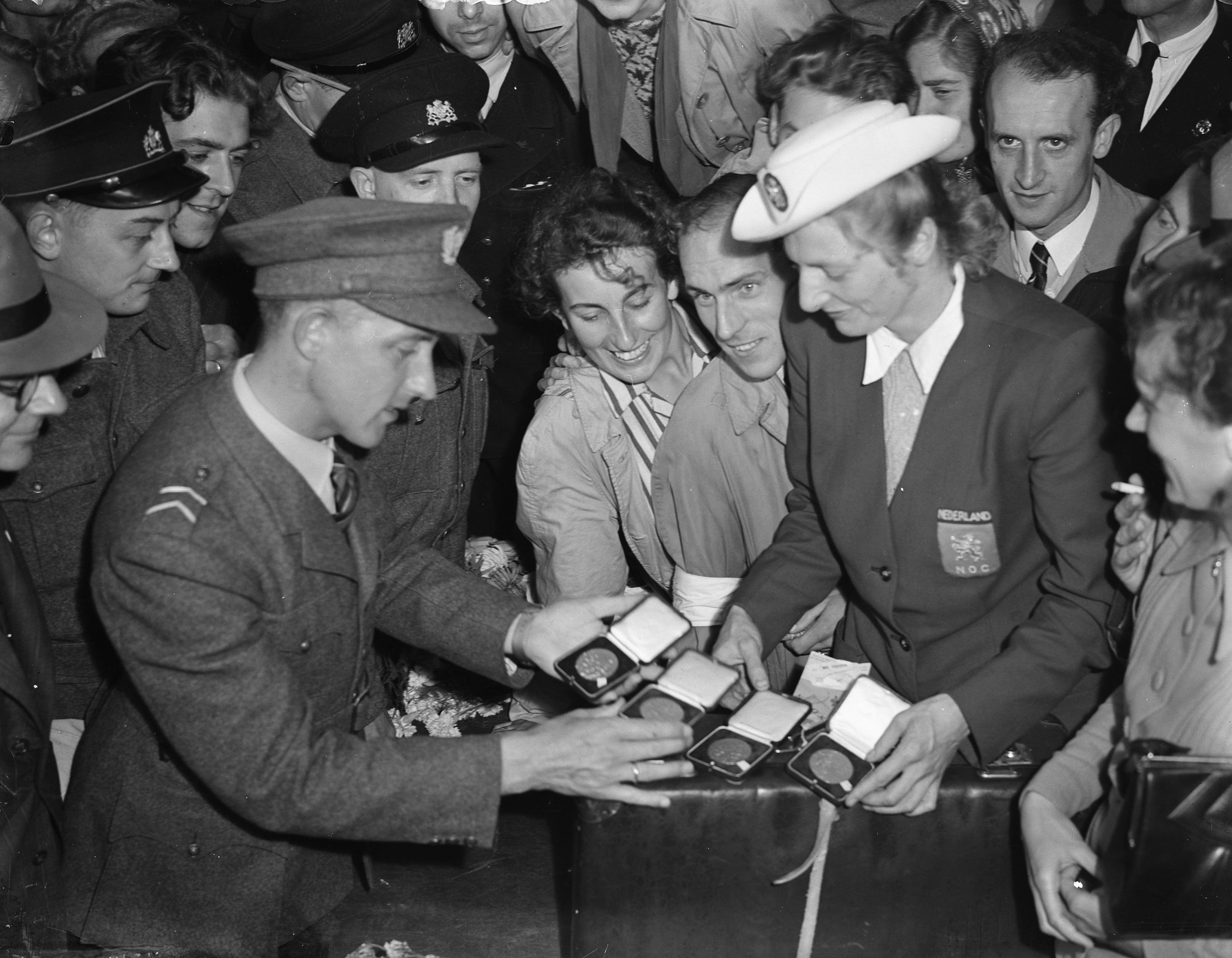 Collectie / Archief : Fotocollectie Anefo Reportage / Serie : [ onbekend ] Beschrijving : De douanebeambtenaar bij Fanny Blankers-Koen met de gouden medailles Datum : 9 augustus 1948 Locatie : Hoek van Holland Trefwoorden : atletes, douane, medailles Persoonsnaam : Blankers-Koen, Fanny Fotograaf : Noske, J.D. / Anefo Auteursrechthebbende : Nationaal Archief Materiaalsoort : Glasnegatief Nummer archiefinventaris : bekijk toegang 2.24.01.09 Bestanddeelnummer : 902-9020